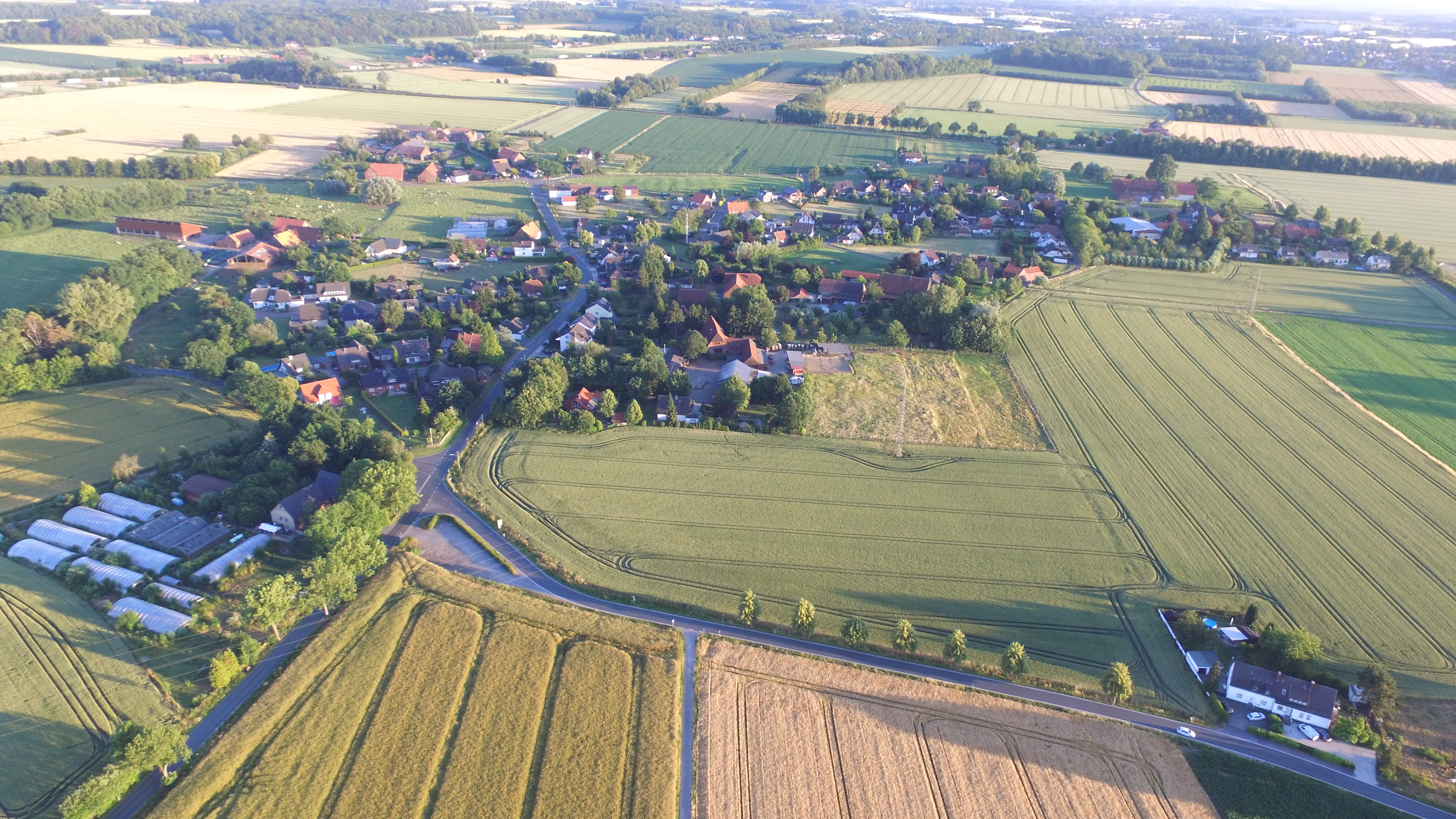 Luftbild